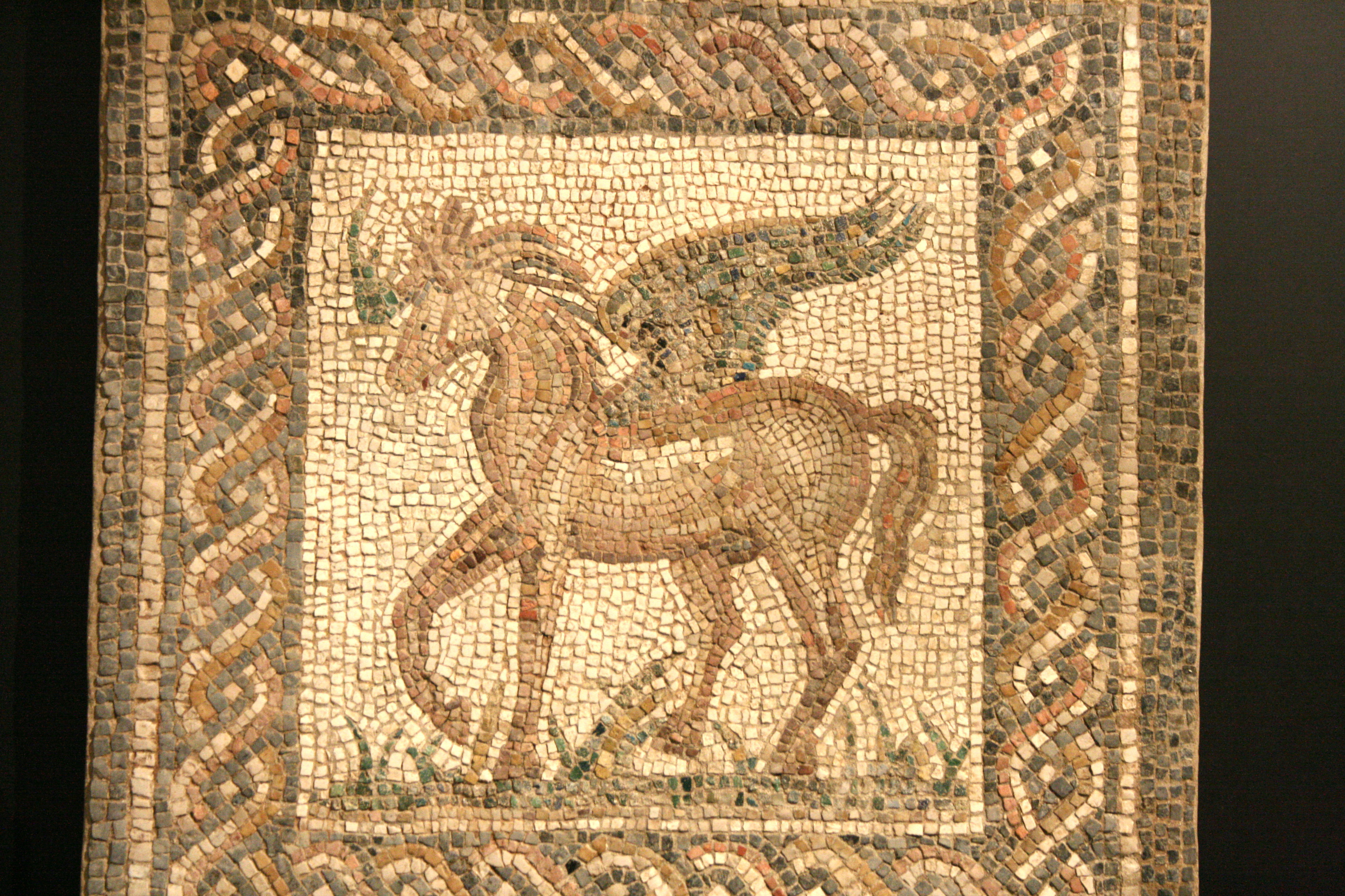 Mosaïque romaine du IIe siècle représentant Pégase. Museo Arqueológico y Etnológico de Córdoba, Spain